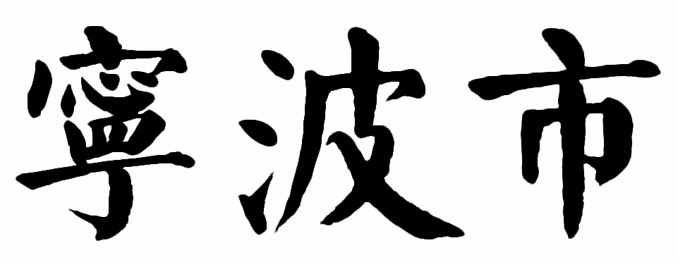 根据颜真卿书法集成的“宁波市”